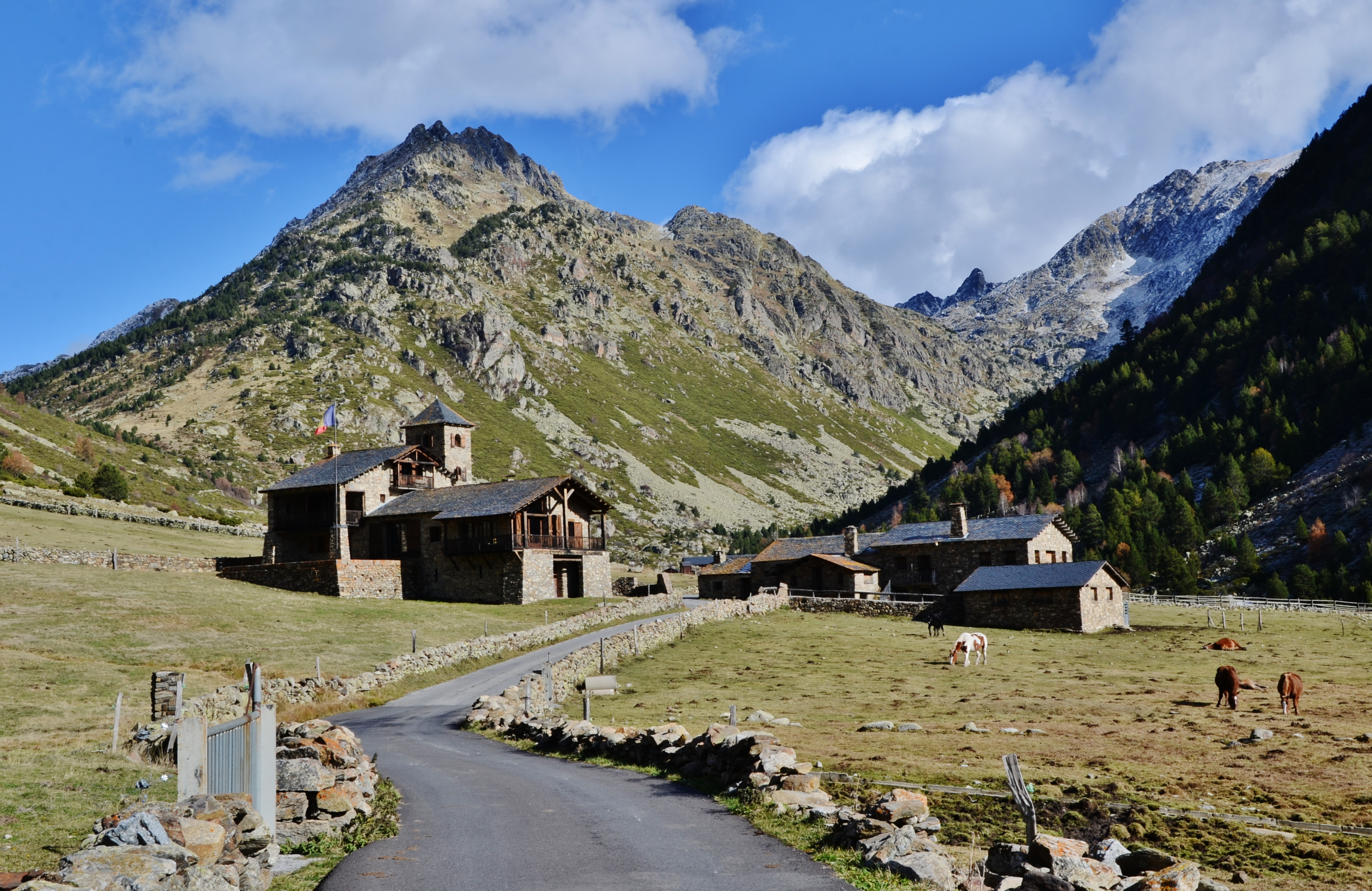 Vall d'Incles i Solana d'Andorra (Canillo) This is a a photo of a natural area in Andorra with id: AD-PNVISA